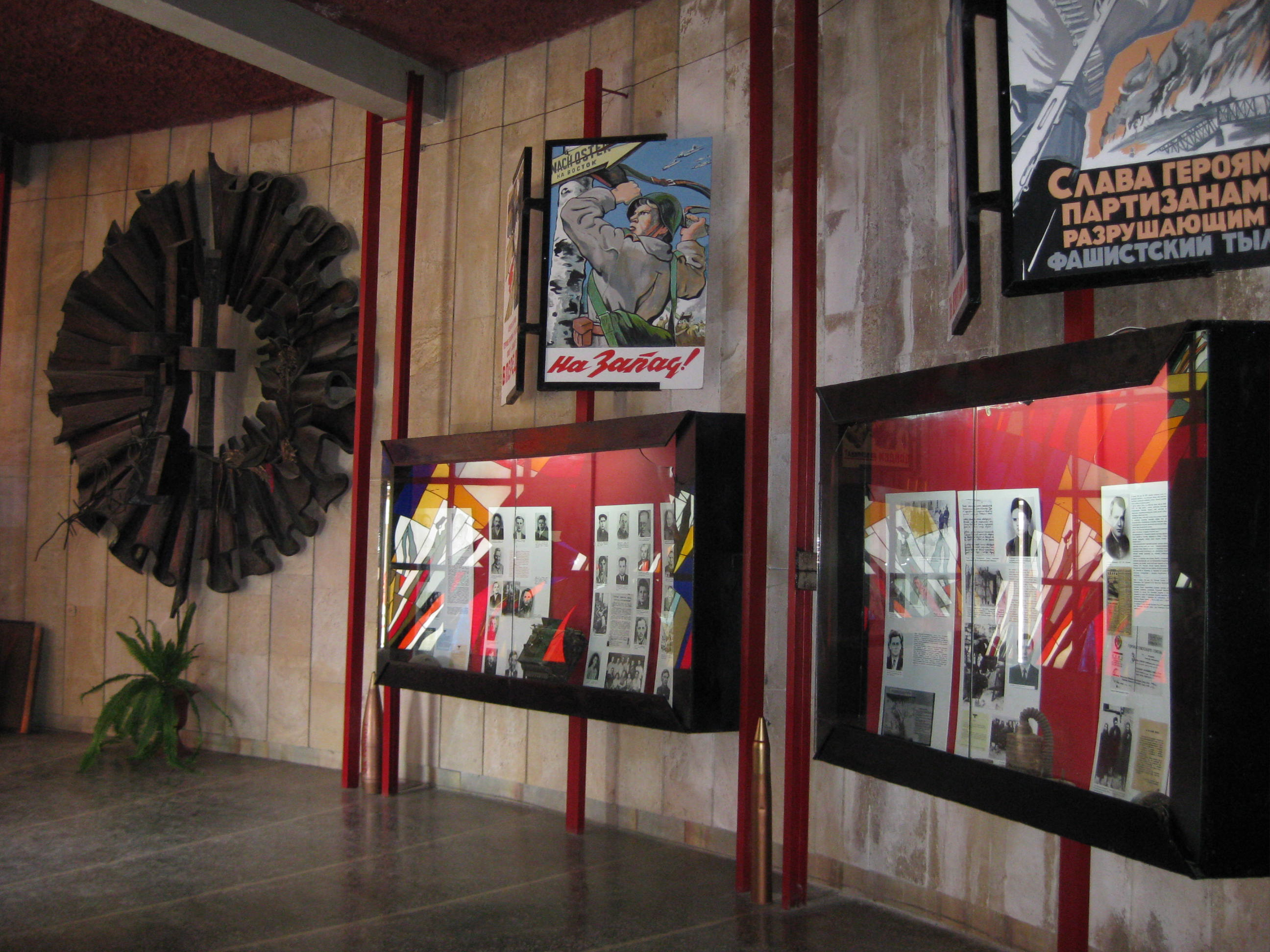 De entree van Het Museum of Partisan Glory in Nerubayske bij Odessa, Oekraïne